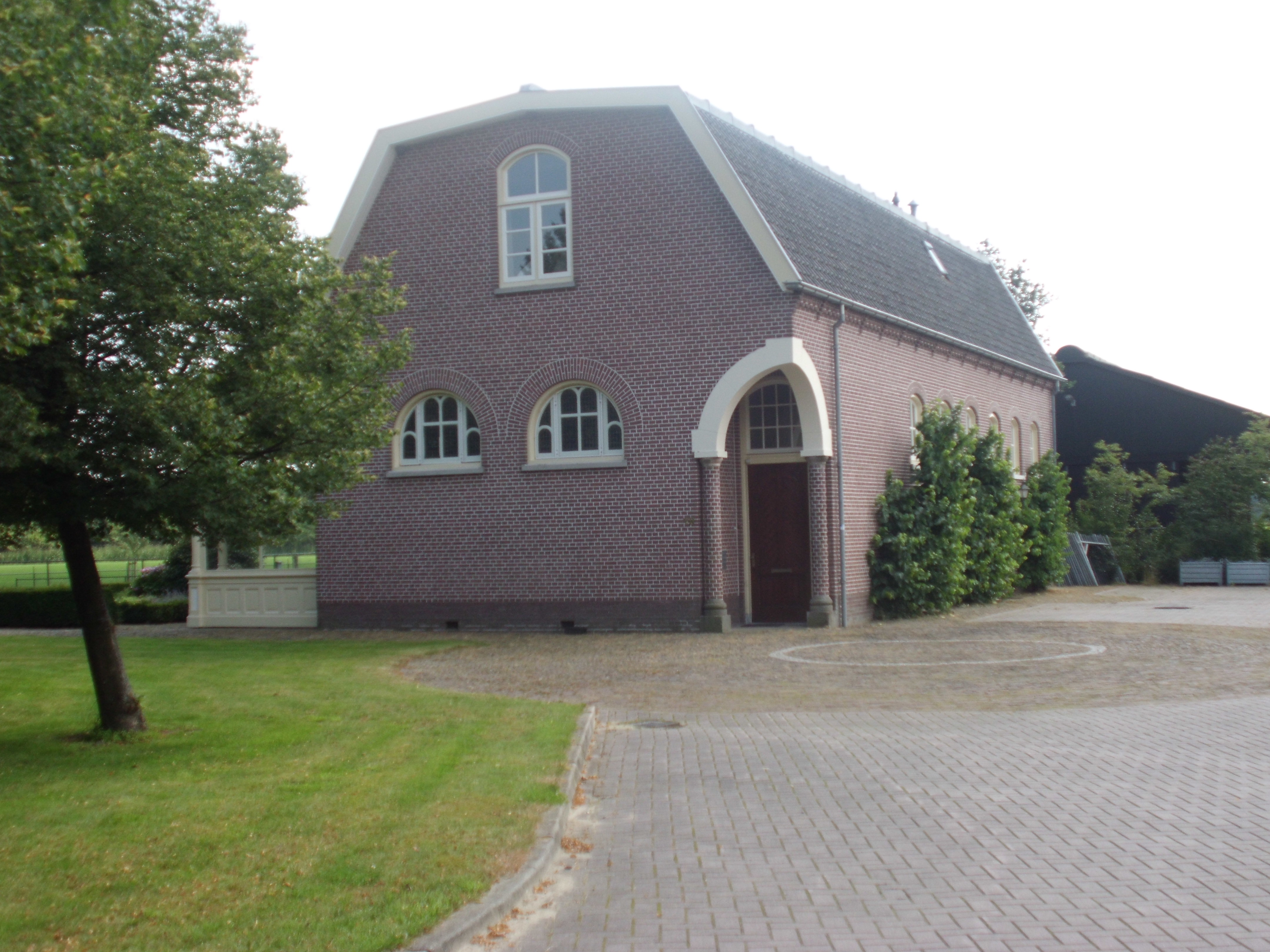 Jachthuis van De Boom Woudenberg